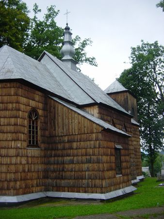 Cerkiew św. Paraskewy w Stefkowej